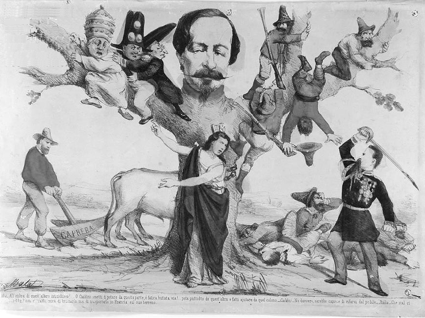 caricature concernant le soutien de la France envers la Papauté lors de l'unité italienne.